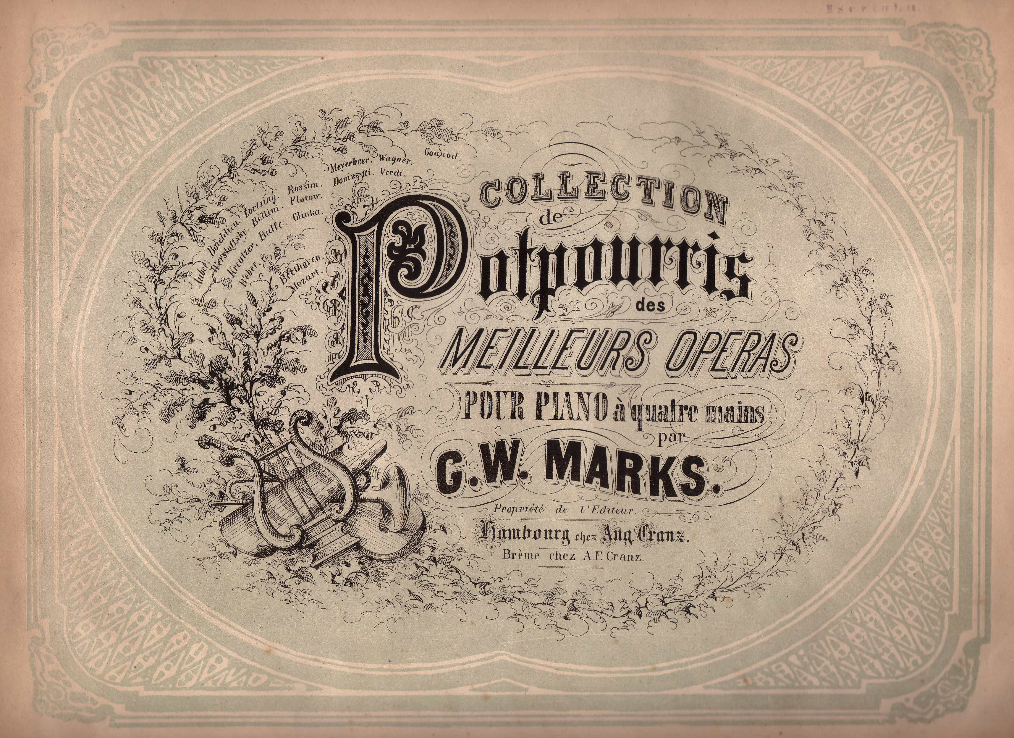 Titelblatt einer unter dem Pseudonym G. W. Marks veröffentlichten Komposition von Johannes Brahms